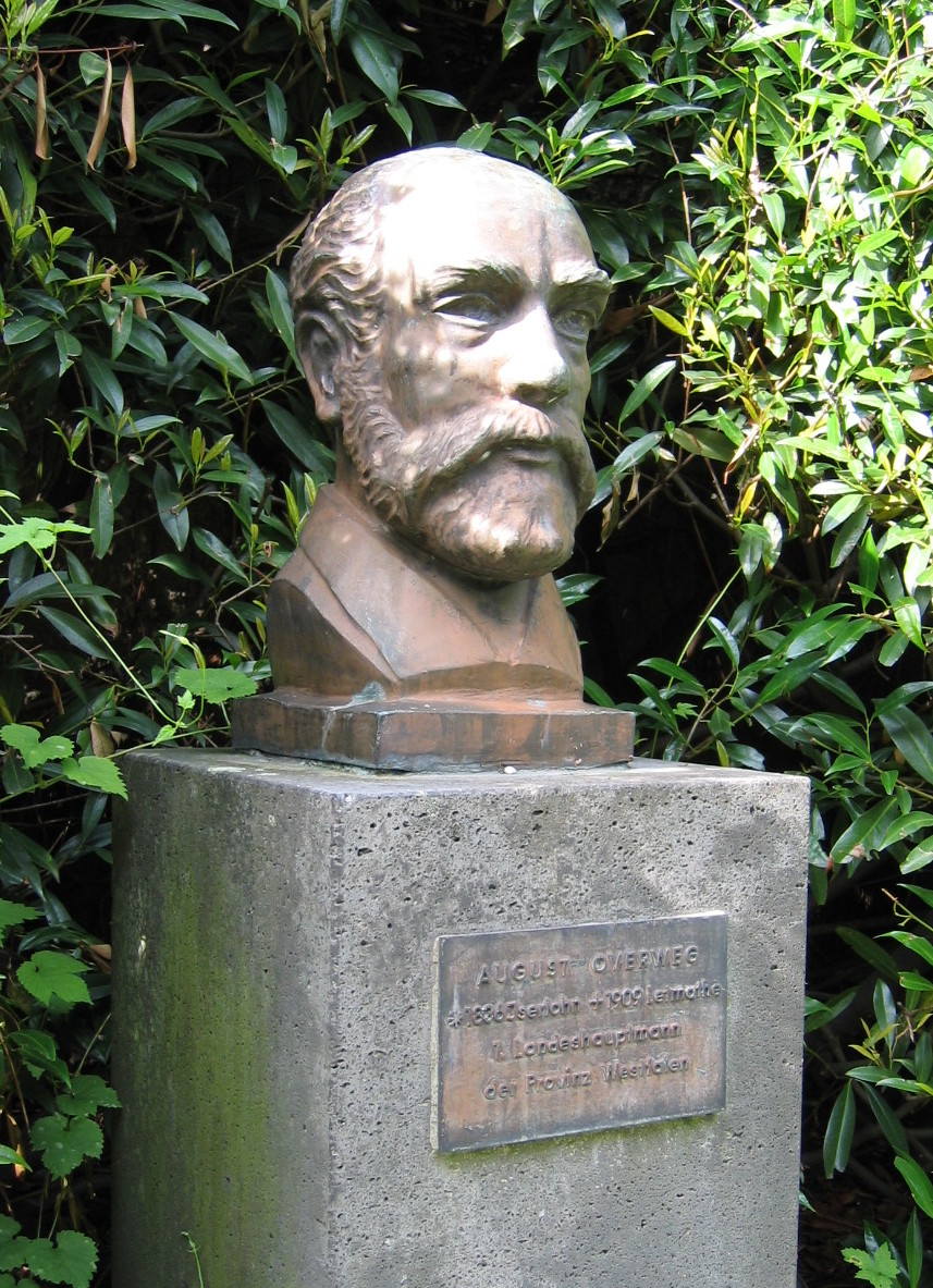 Büste des August Overweg vor Haus Letmathe in Iserlohn (Germany)